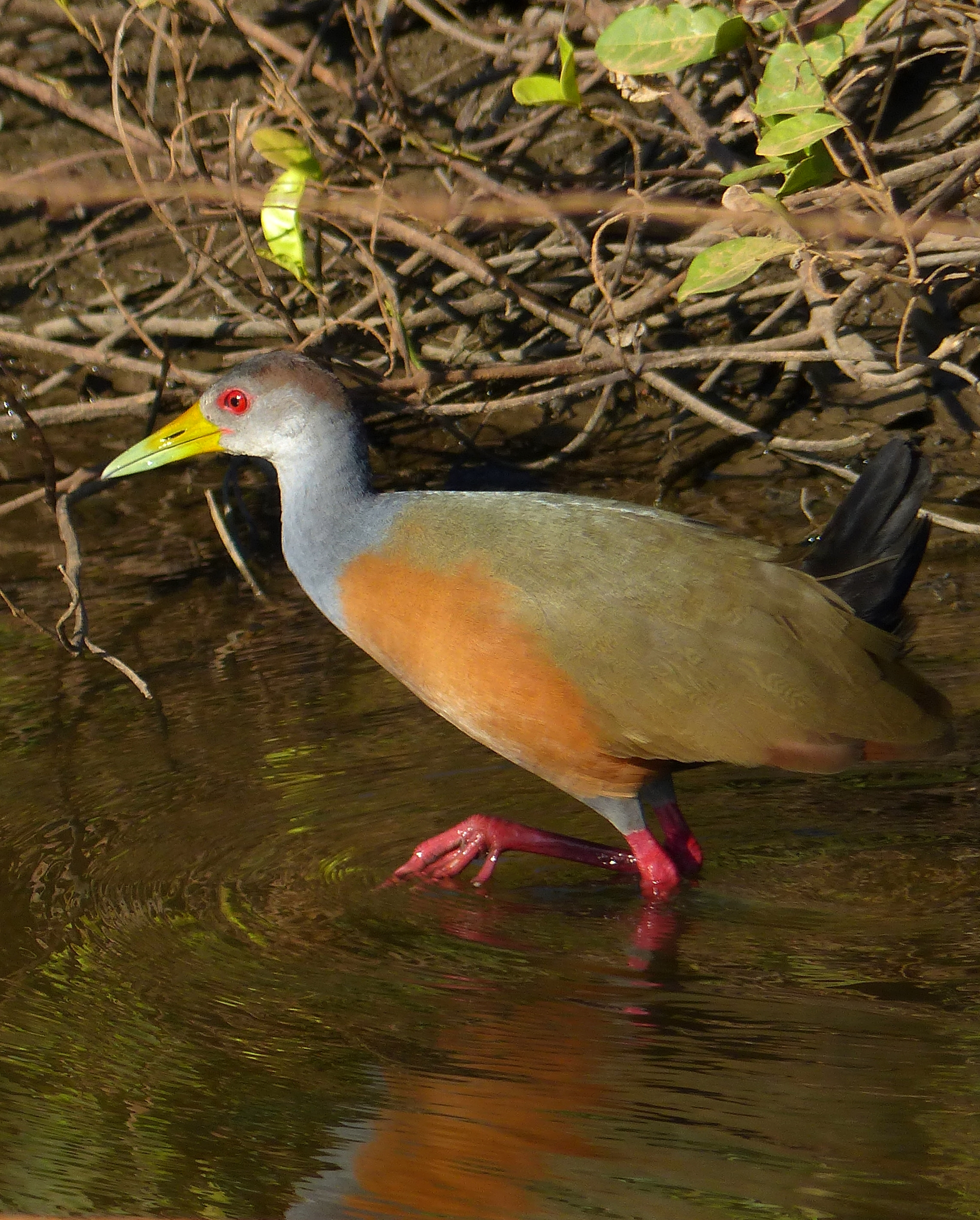 Transpantaneira, Poconé, Mato Grosso, BRAZIL